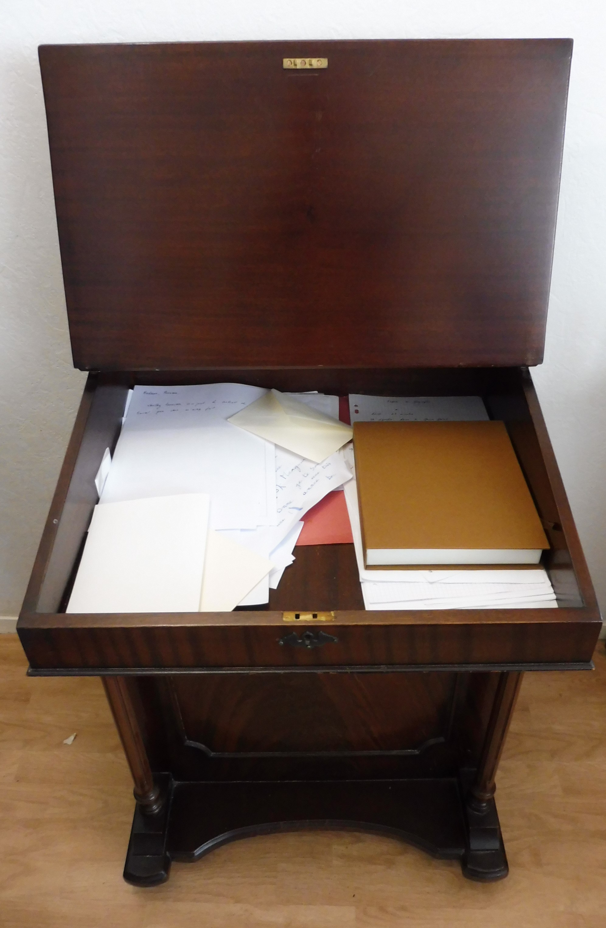 Vue de face d'une copie d'un secrétaire Davenport plaqué en acajou et réalisé au XXe siècle dont le battant a été ouvert pour en montrer l'intérieur